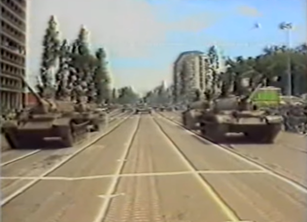 Des blindés des forces armées zaïroises lors d'un défilé. Extrait du reportage "Mobutu Sese Seko : bâtisseur du Zaïre nouveau", 1985, diffusé via la RTBF